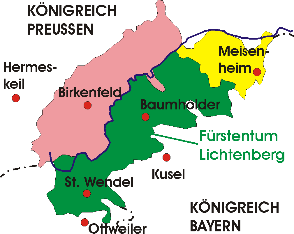 Karte Fürstentum Lichtenberg